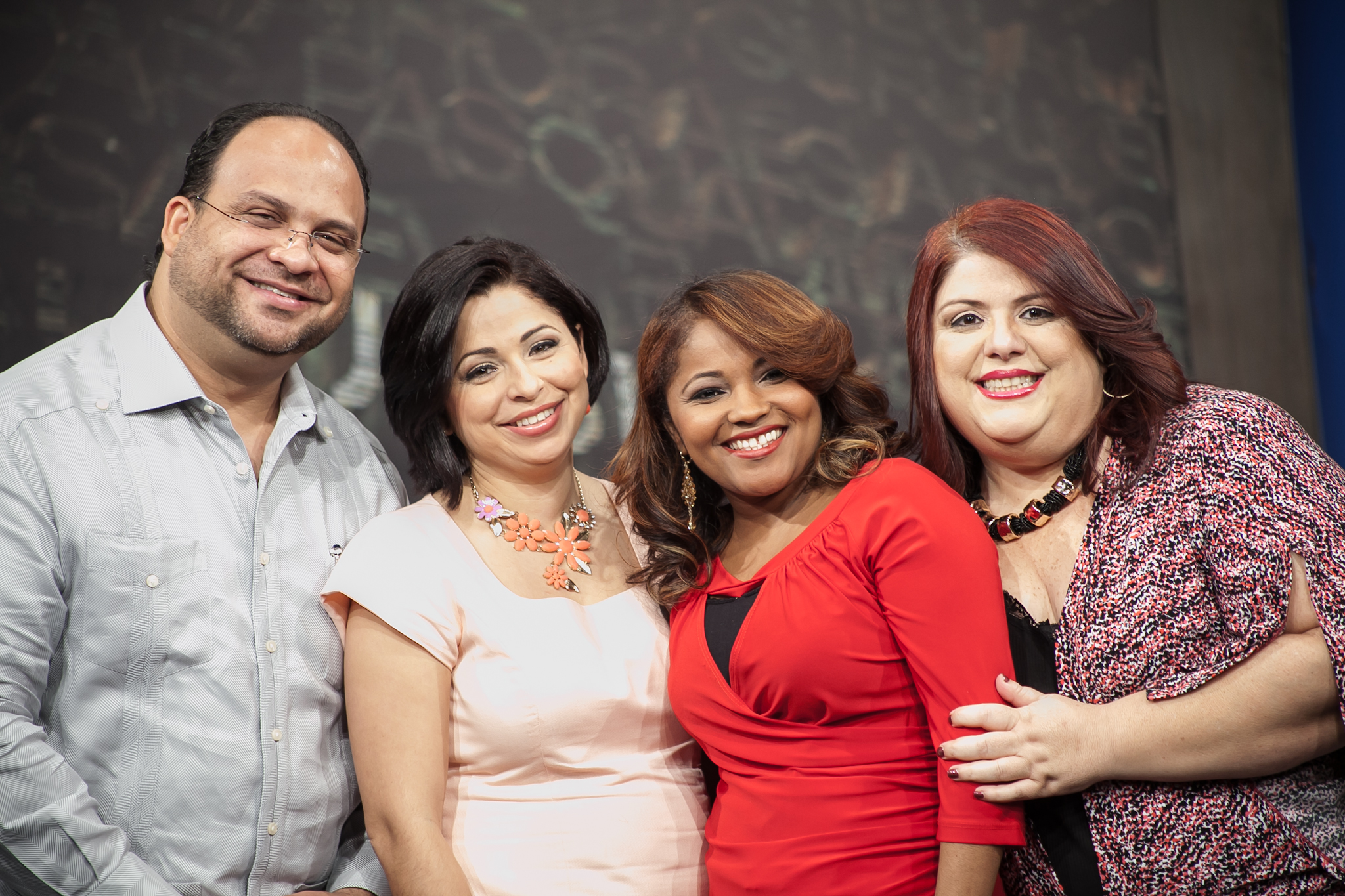 Benito Acevedo, Vivian Uceta, Juana Rodríguez e Hilda Cid, presentadores de Siguiendo Sus Huellas.